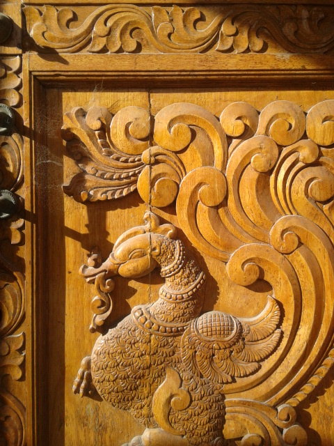 Carving on the doors of Shiva Vishnu Temple in Victoria Australia